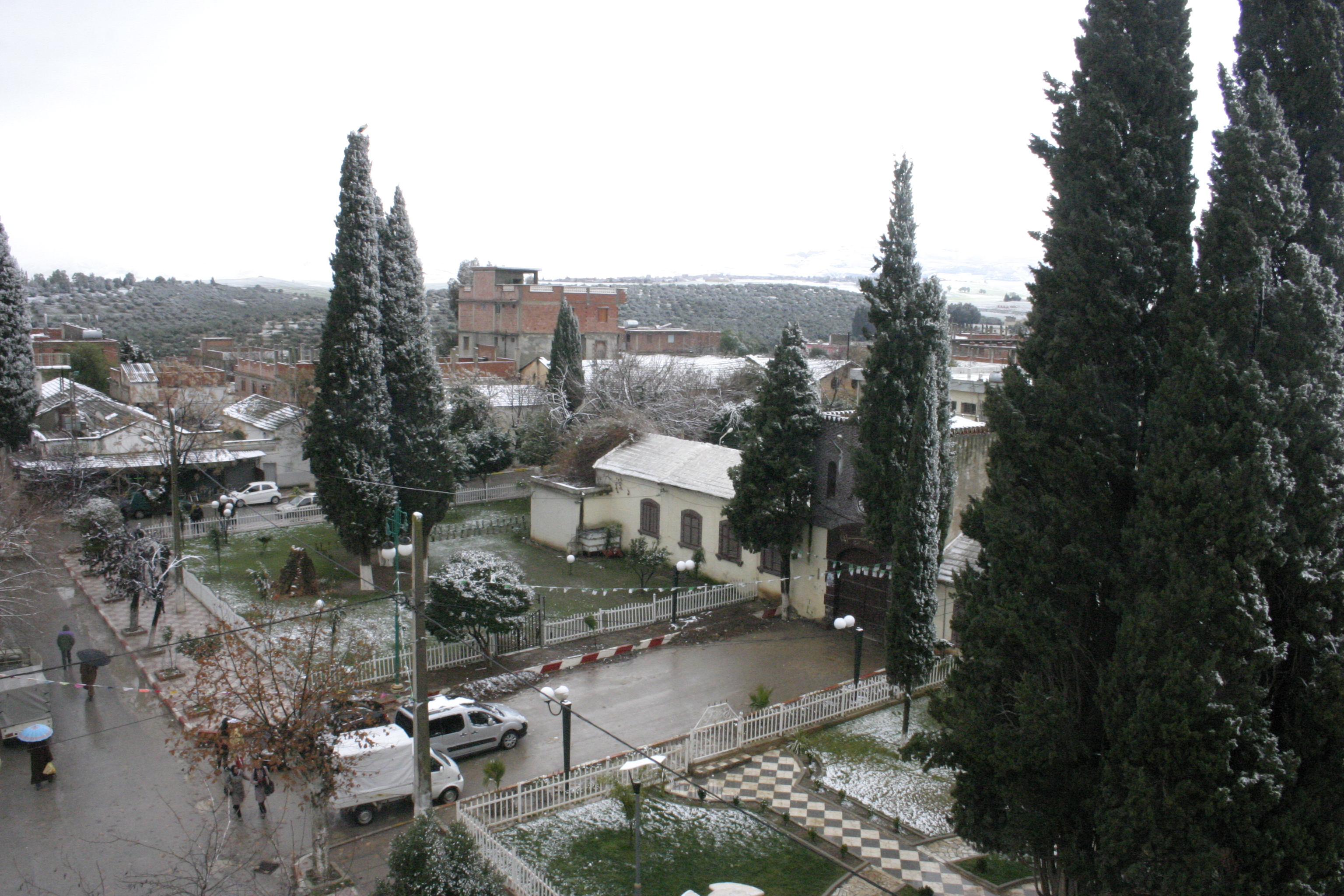 رجاص